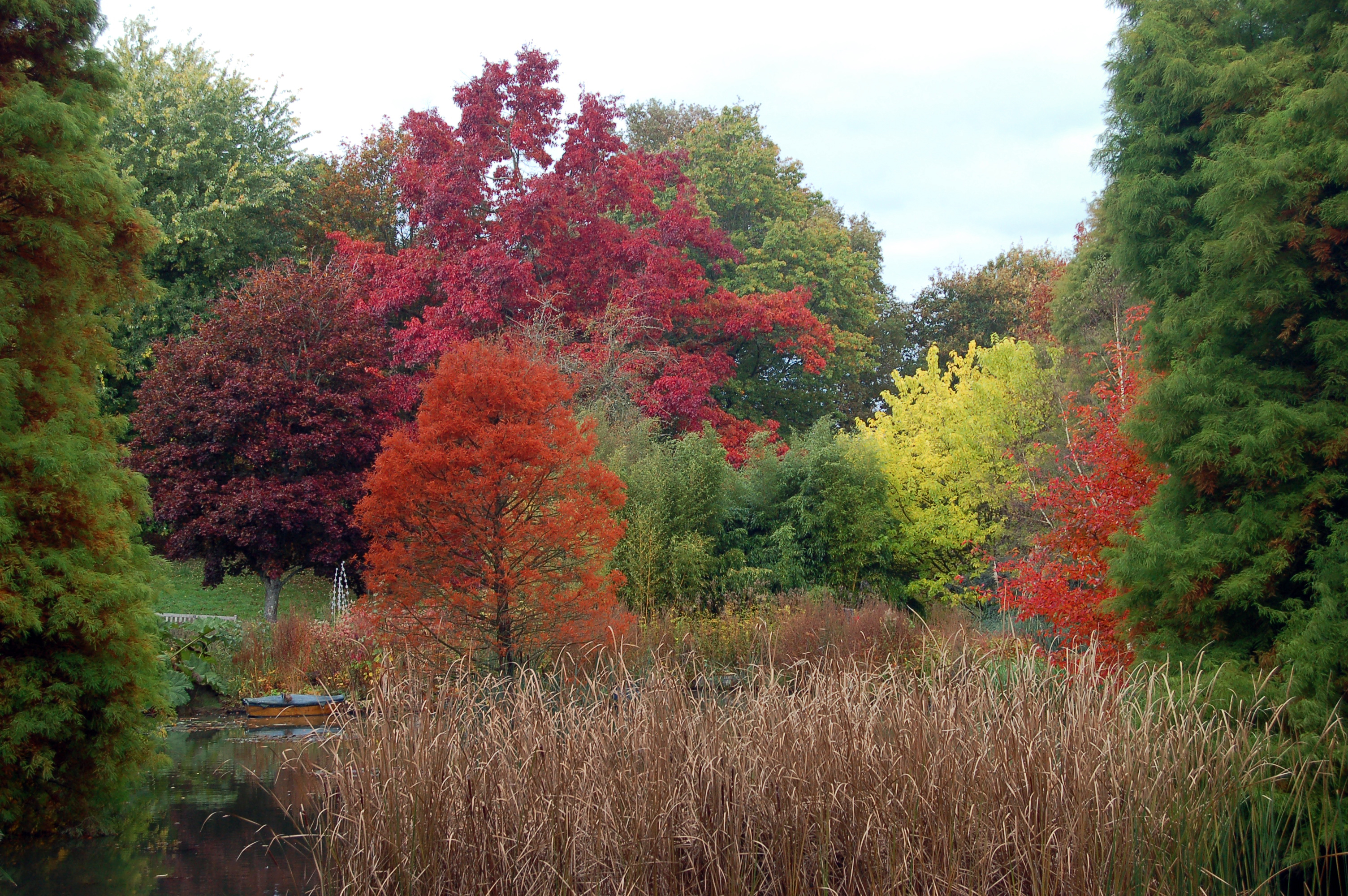 Autumn Colours @ Hillier Gardens